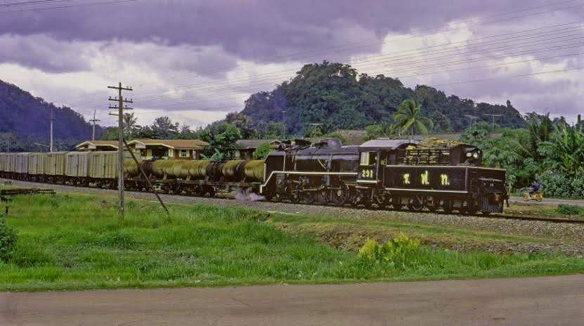 รถจักรไอน้ำแปซิฟิกหมายเลข 291 ขณะทำขบวนรถสินค้า บนทางรถไฟสายชุมทางทุ่งสง-กันตัง, จังหวัดนครศรีธรรมราช ในปี พ.ศ. 2516